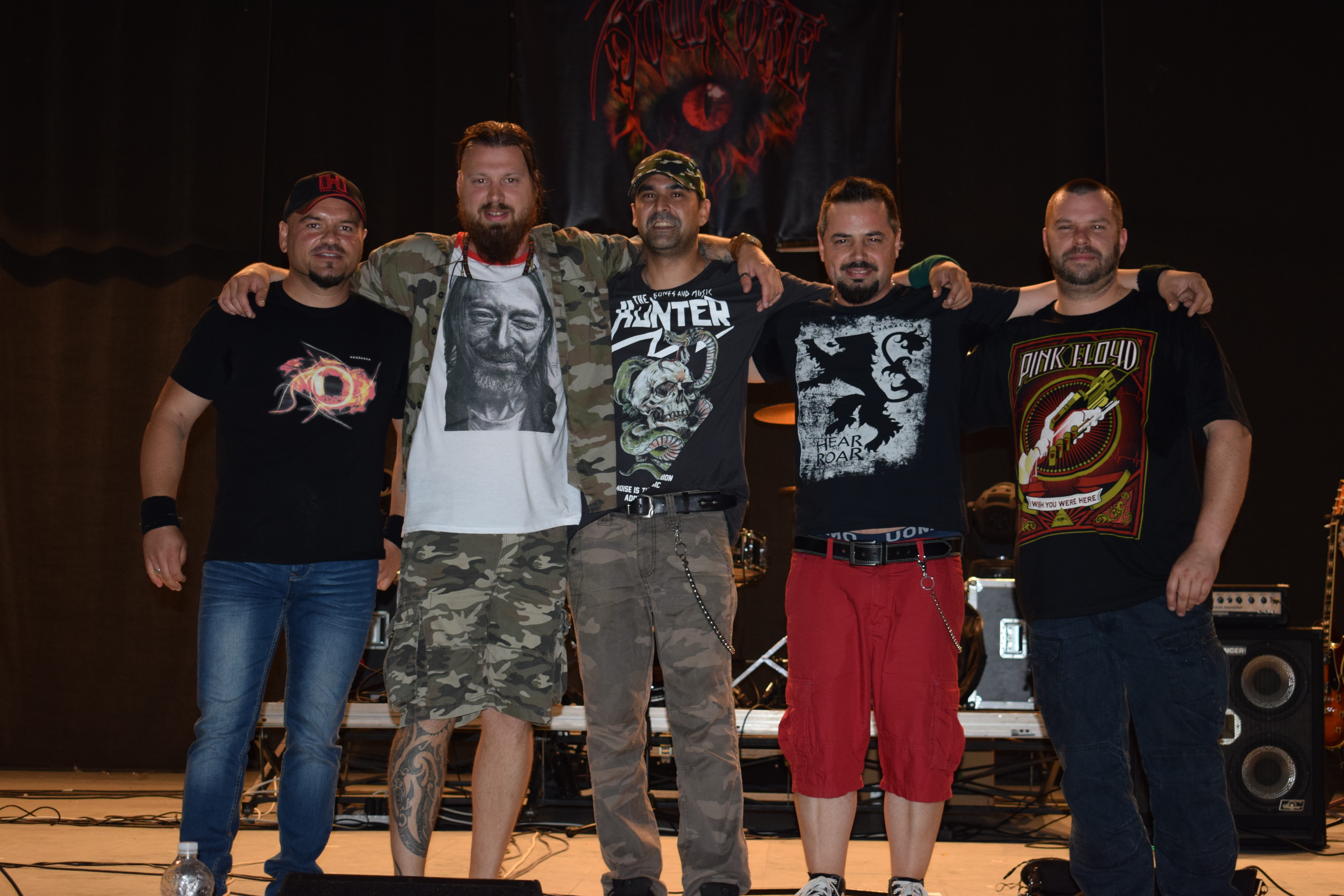 Soulcore, Летен театър - Бургас